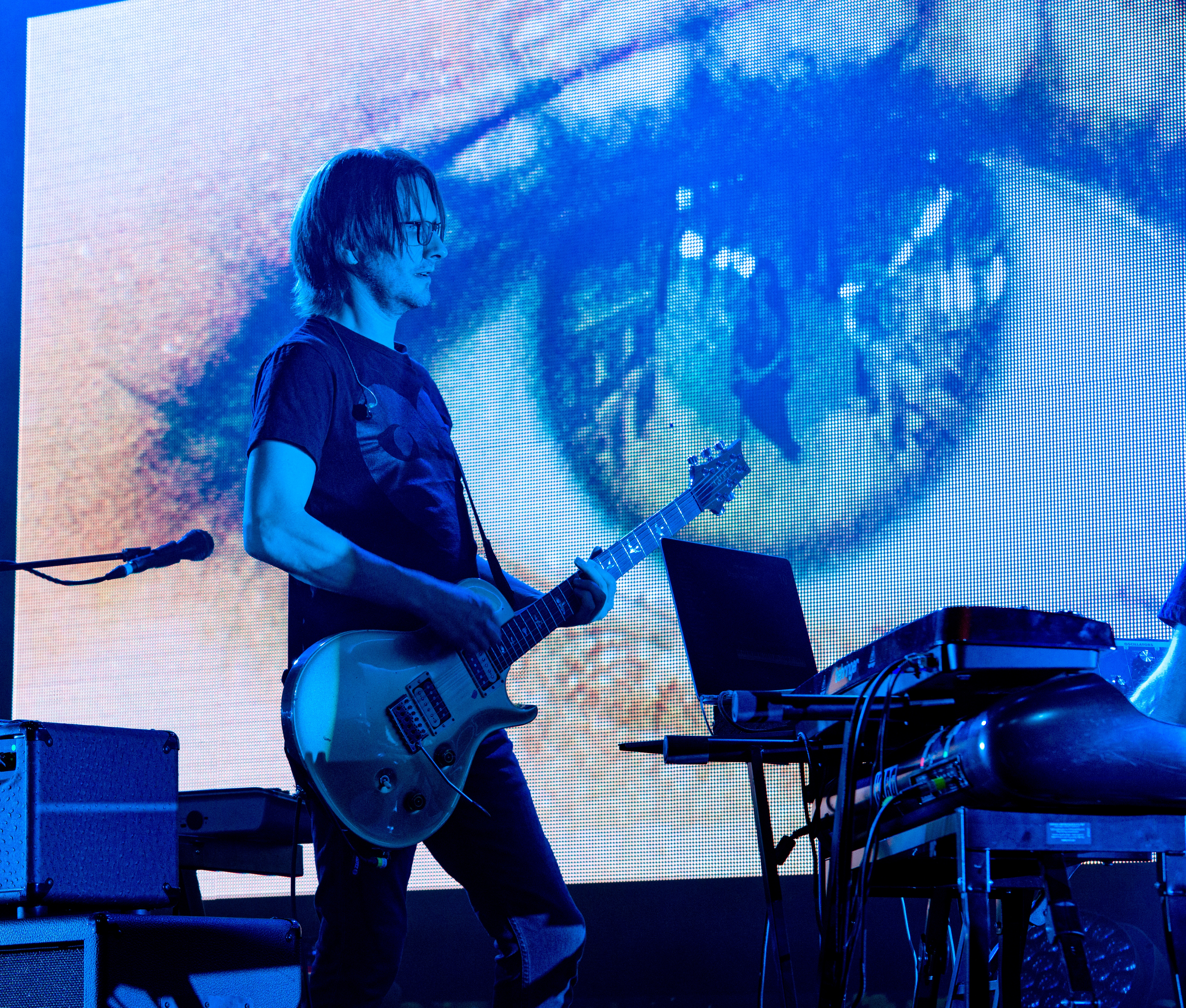 Bilder vom Zelt Musik Festival 2018 in Freiburg im Breisgau Das Eröffnungskonzert mit Steven Wilson